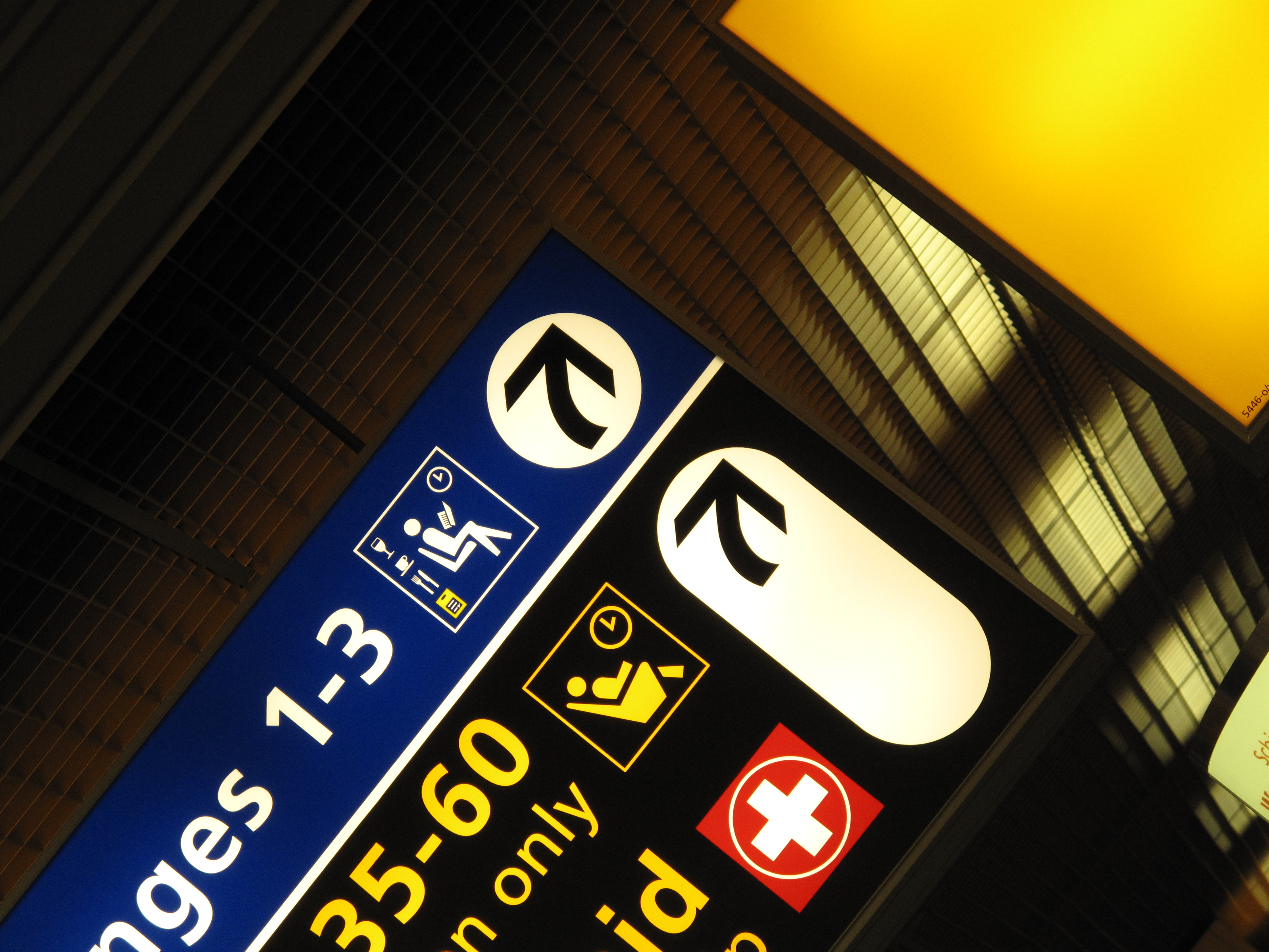 Detalle de un panel informativo del aeropuerto de Schiphol (Amsterdam), diseñado por Paul Mijksenaar